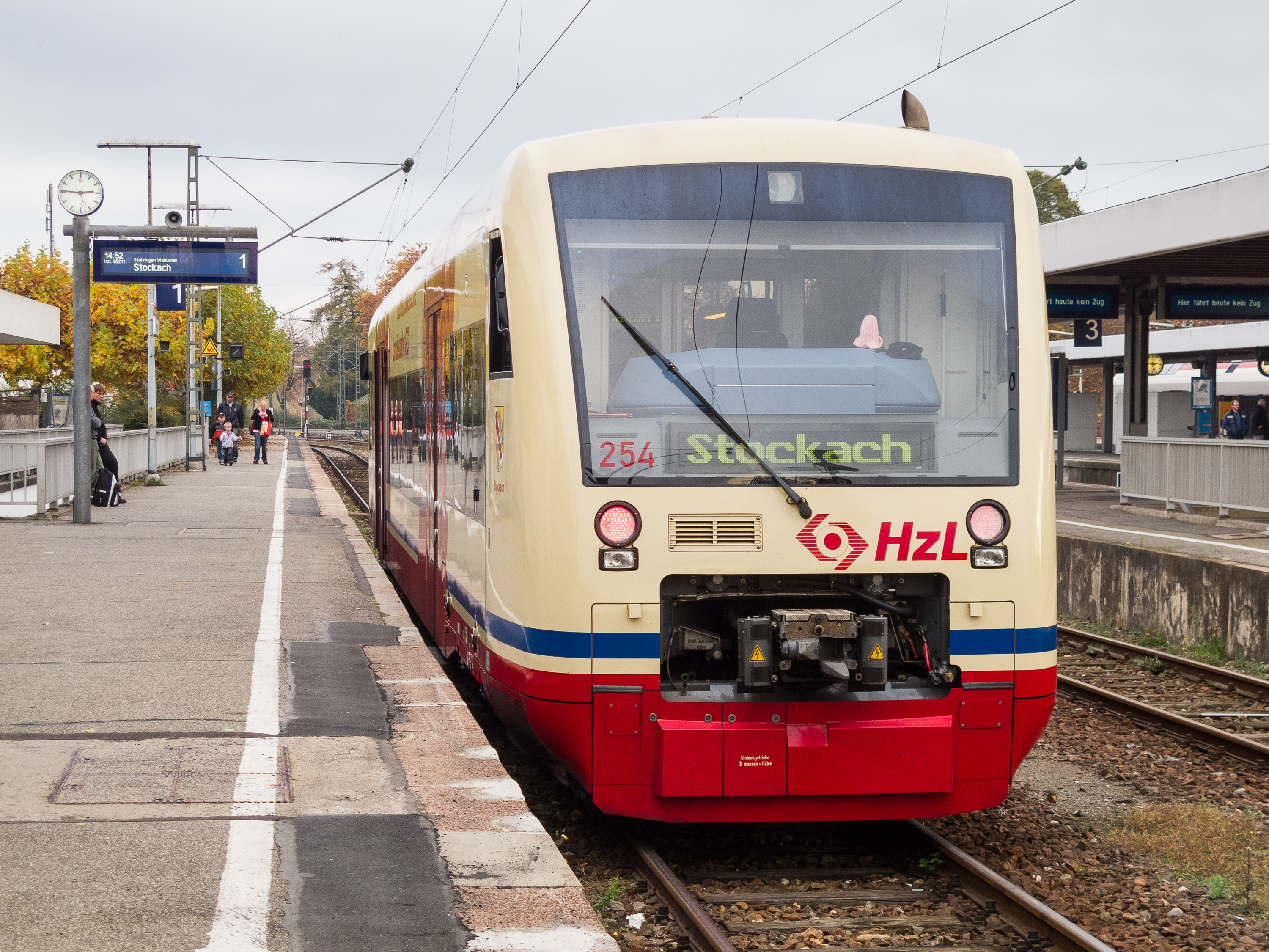 "Seehäsle" Regio Shuttle der Hohenzollerischen Landesbahn mit Ziel Stockach am Stadtbahnhof Radolfzell